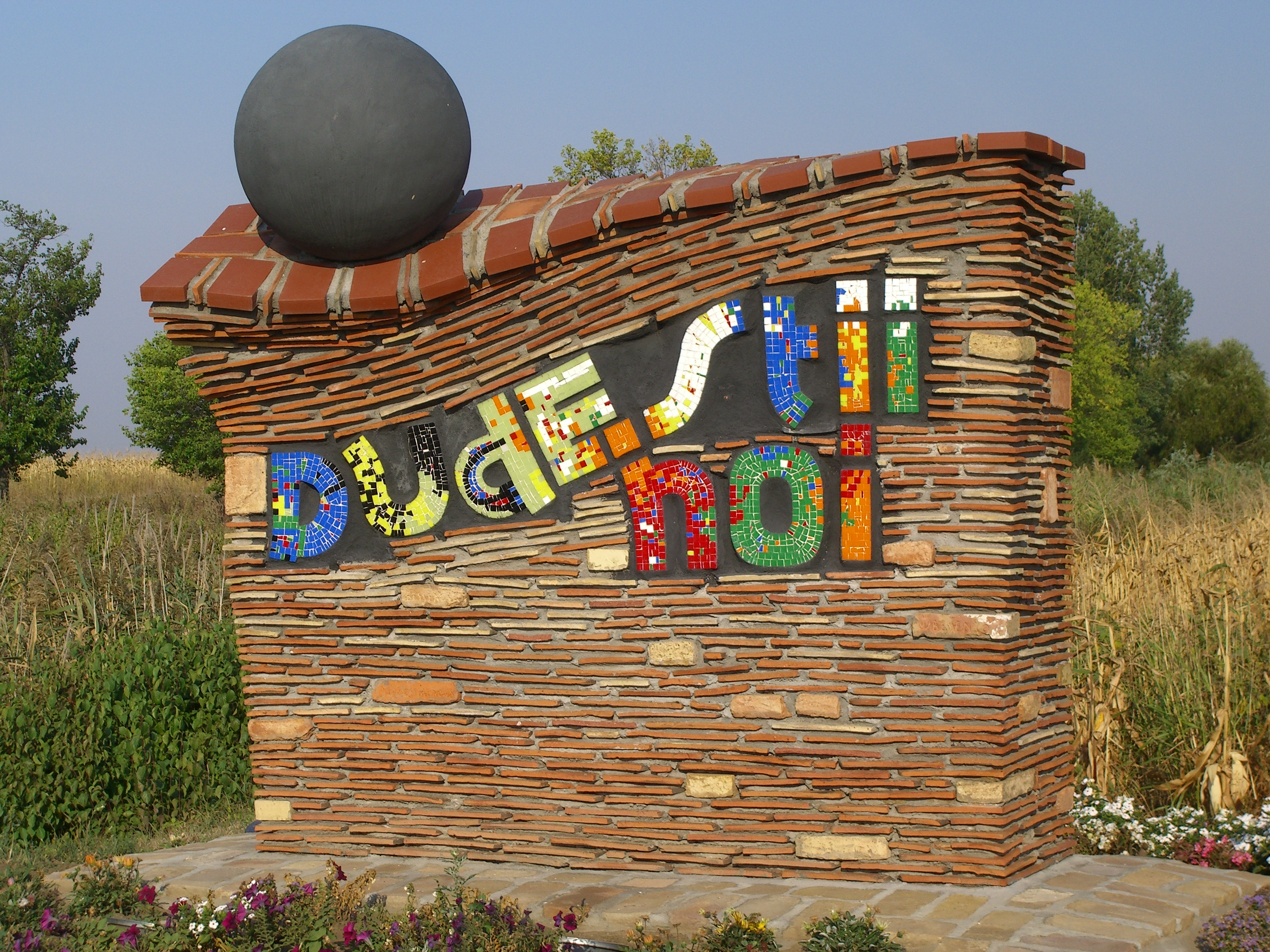 Kunst am Ortseingang von Dudeştii Noi